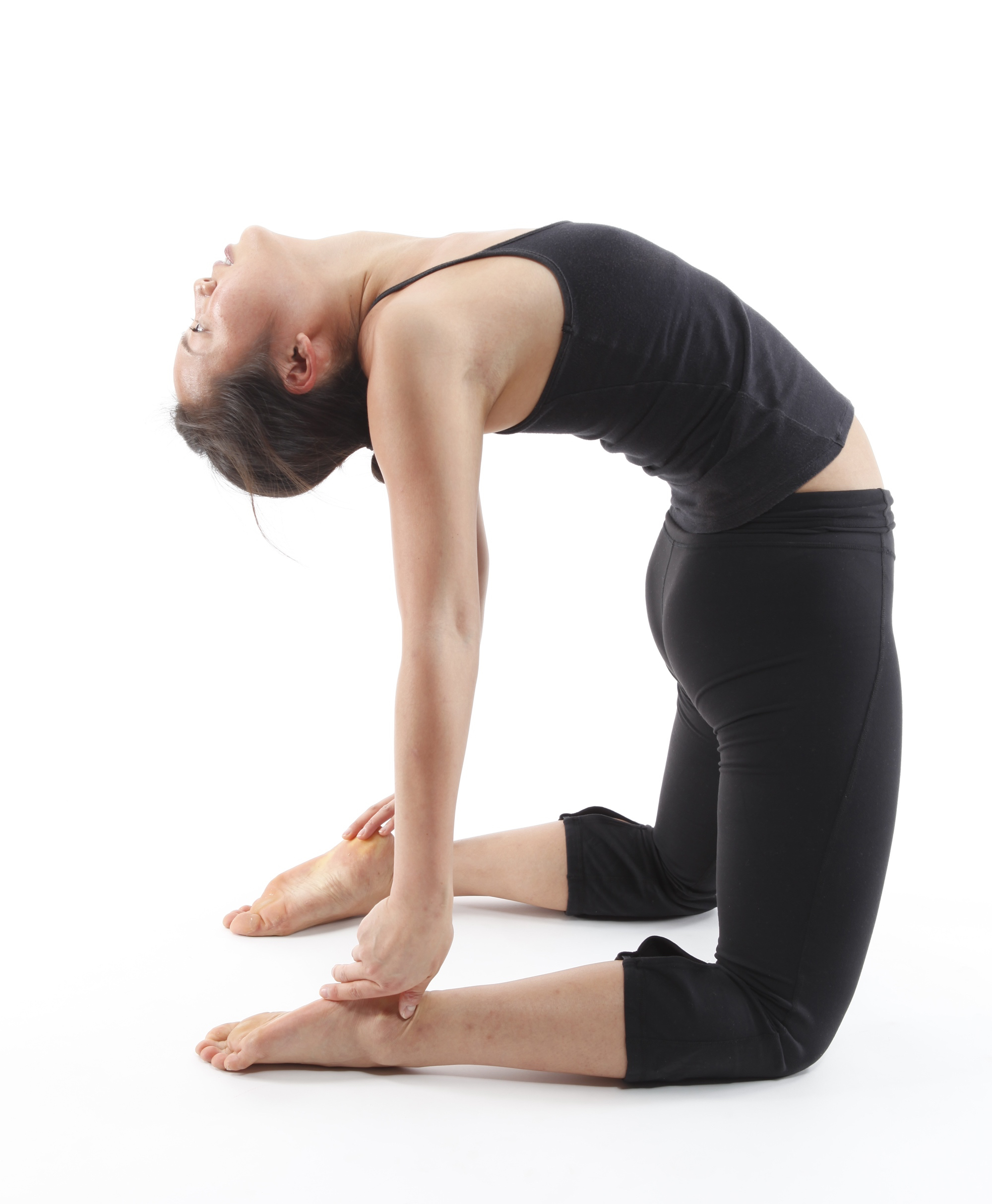 Yoga Asana Ustrasana (Camel Pose) A basic kneeling backbend